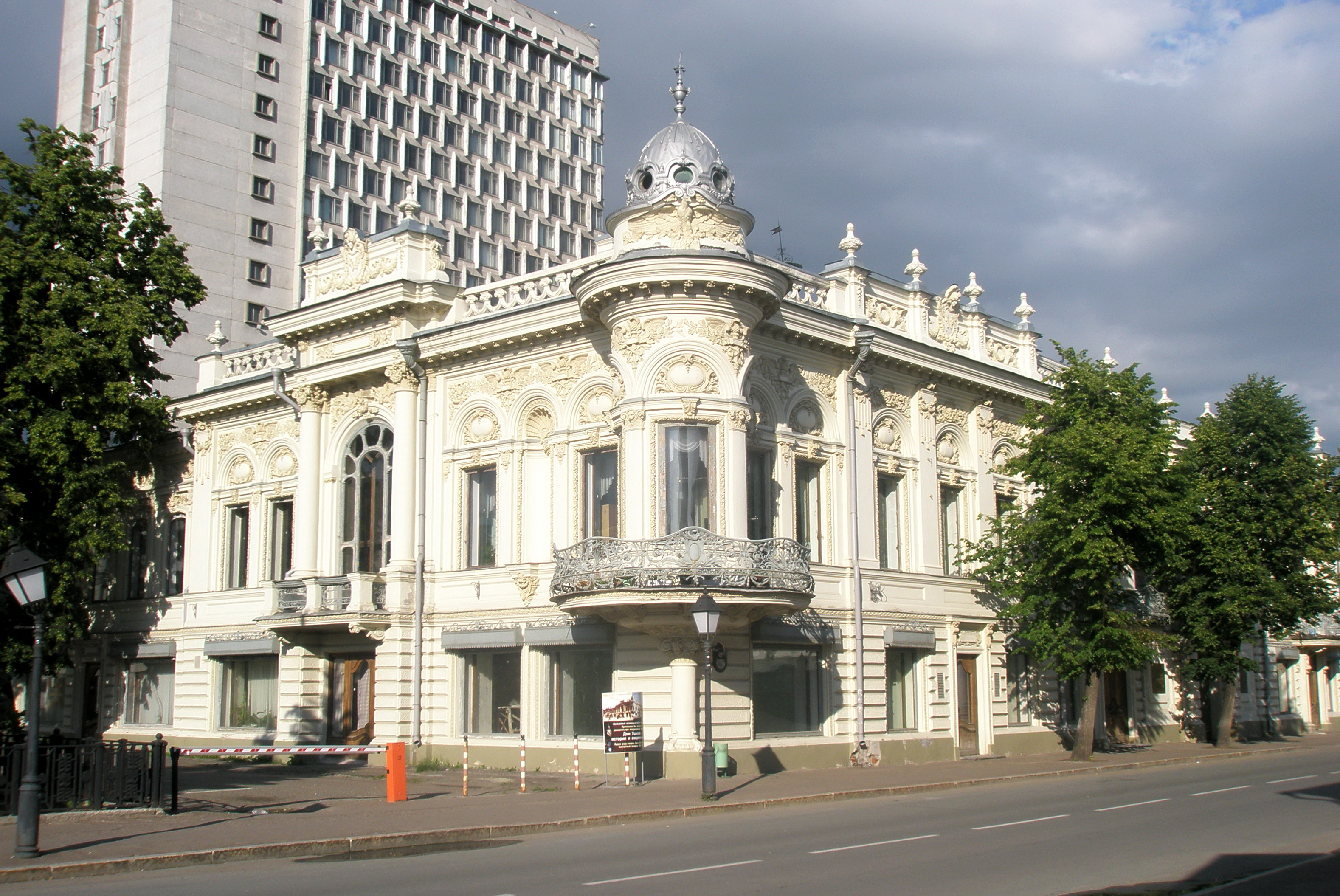 Дом Ушковой (Казань)